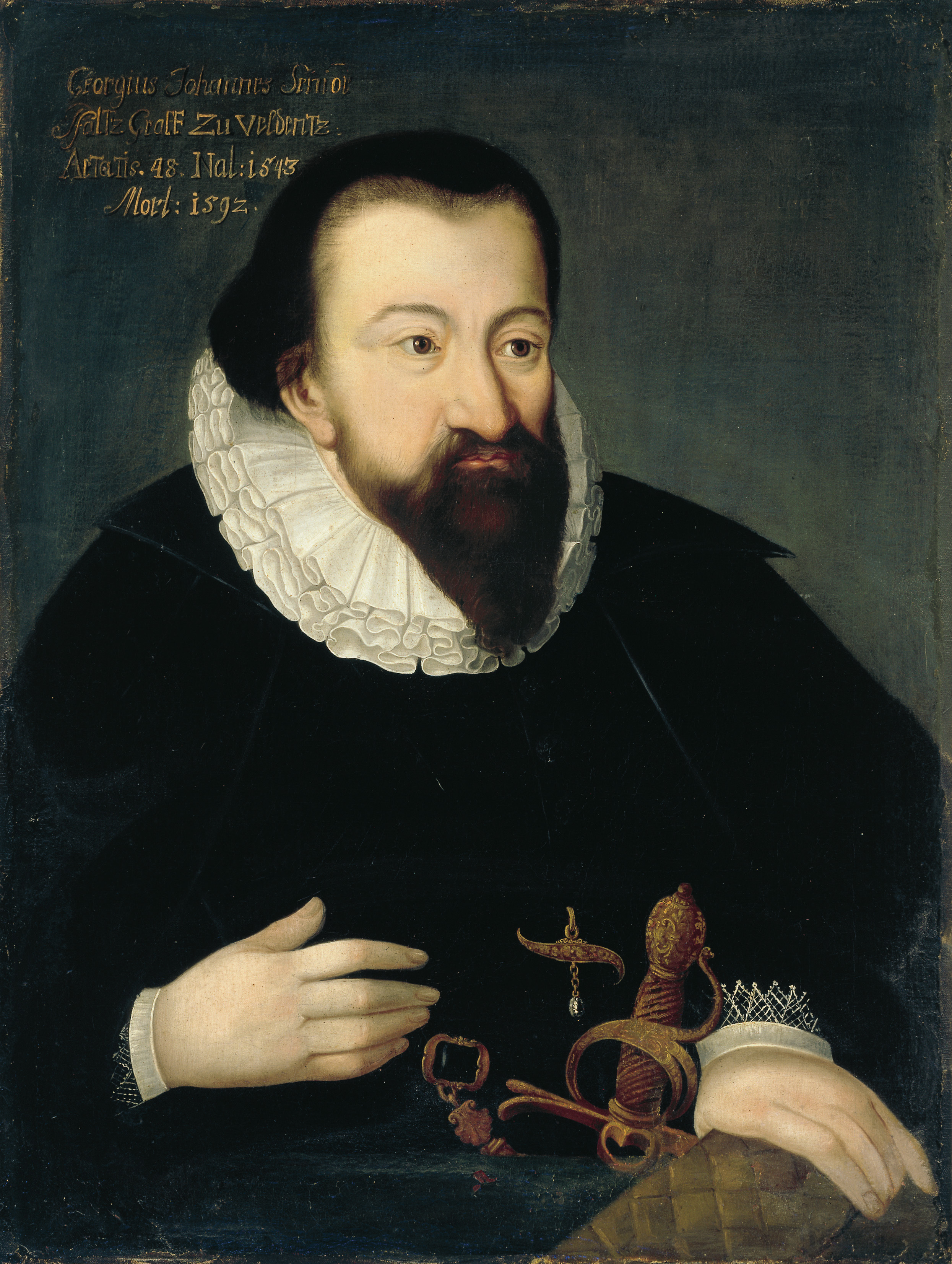 Portret van George Johan van Palts-Veldenz